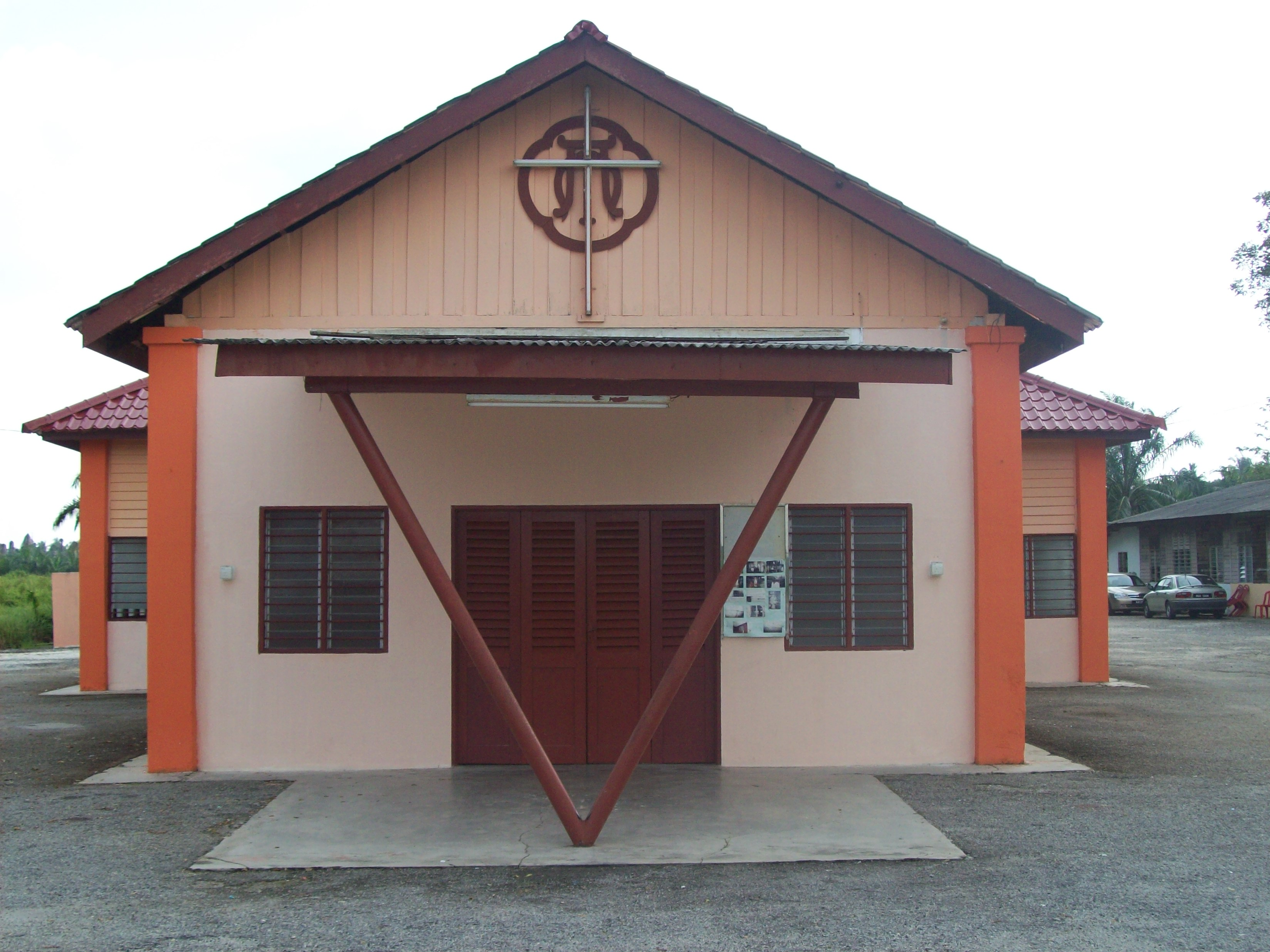 Asam Jawa, 45000 Bukit Rotan, Selangor, Malaysia